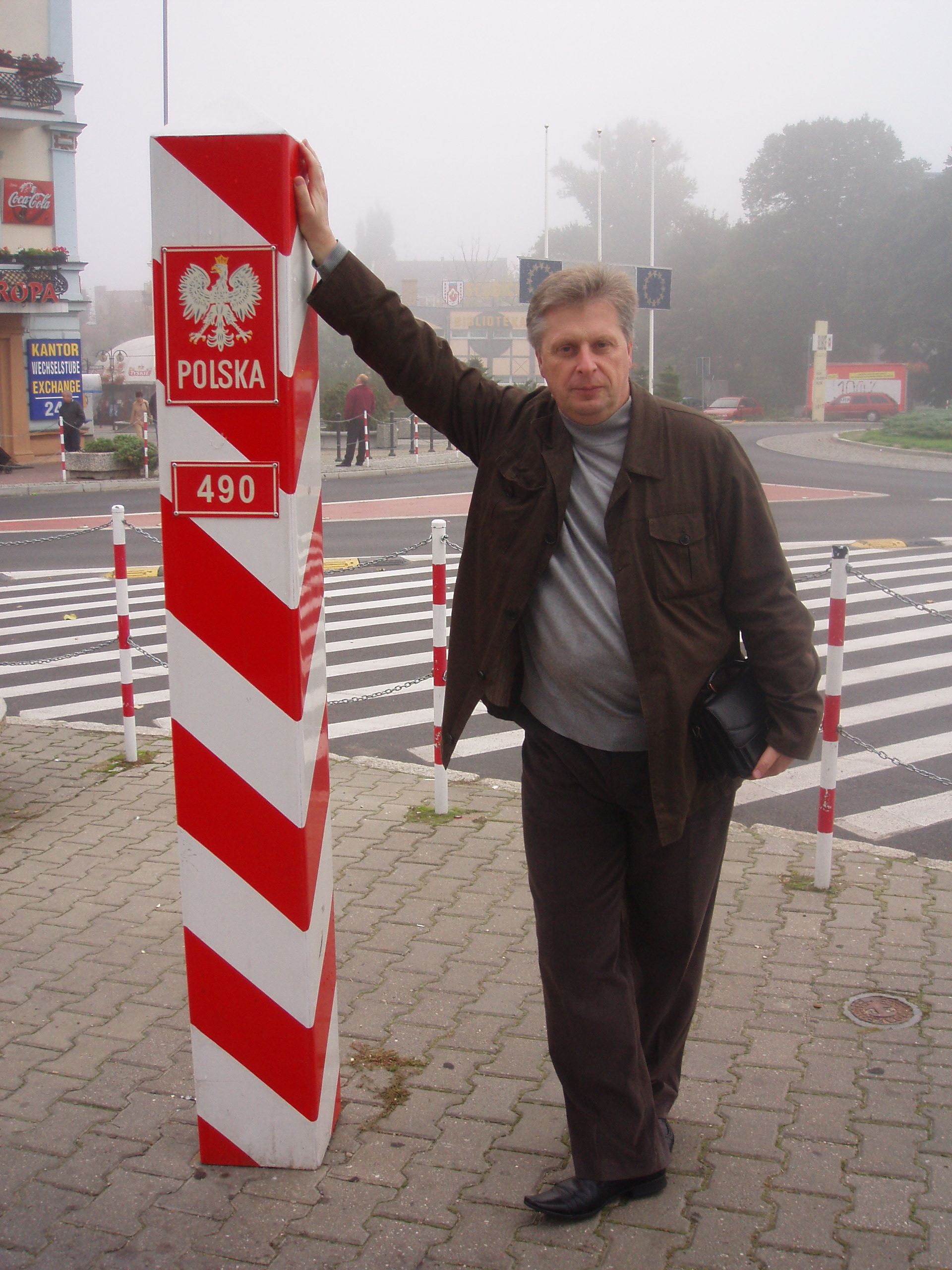 Петро Кралюк на польсько-німецькому кордоні